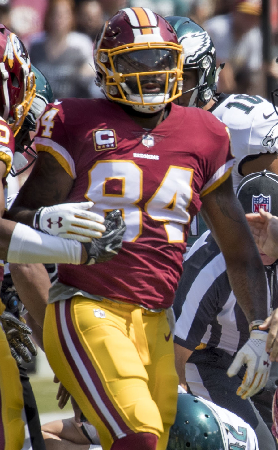 Eagles at Redskins 9/10/17